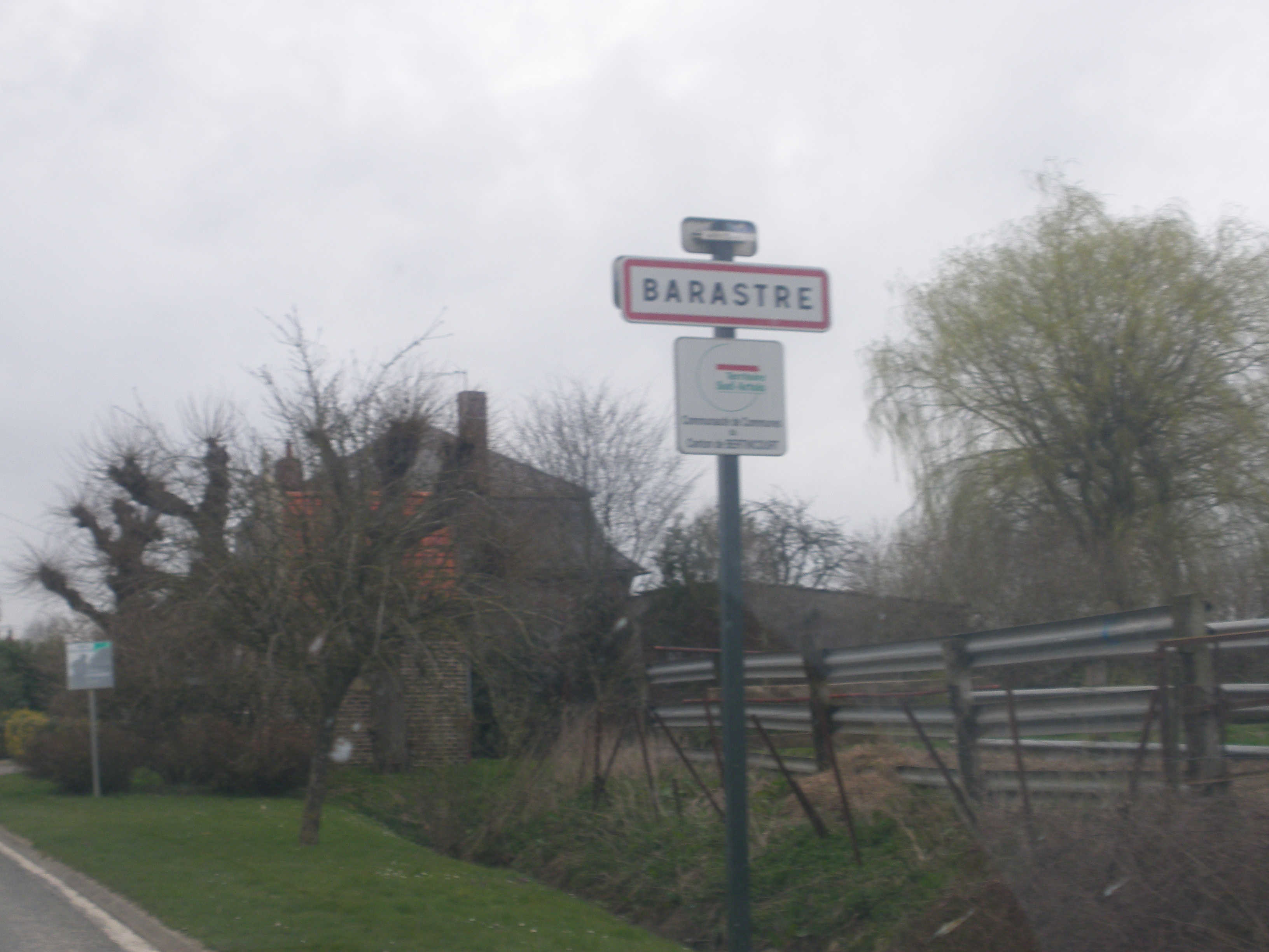 Un panneau d'entrée de la commune de Barastre.